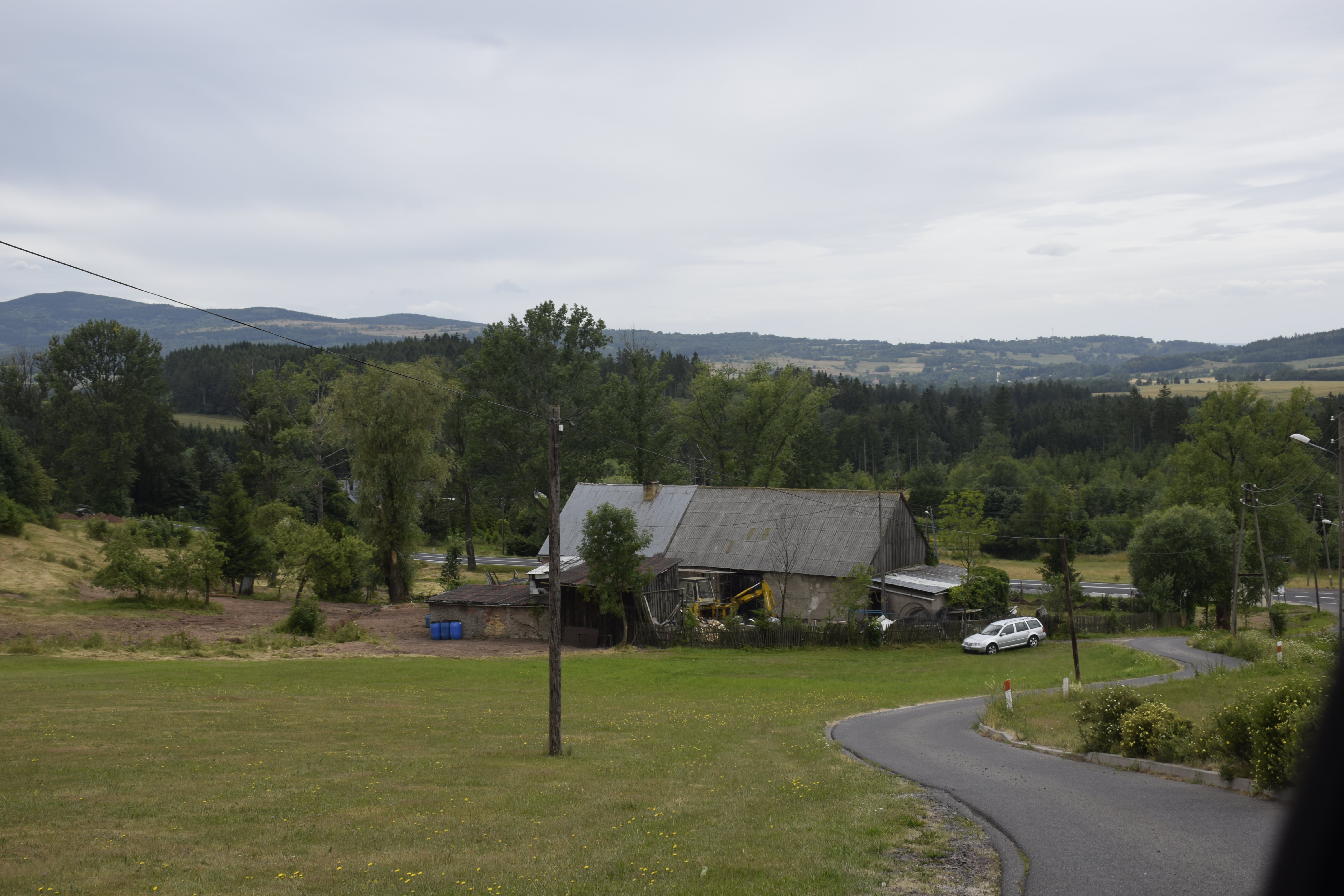 Pustelnik (województwo dolnośląskie) Polska.